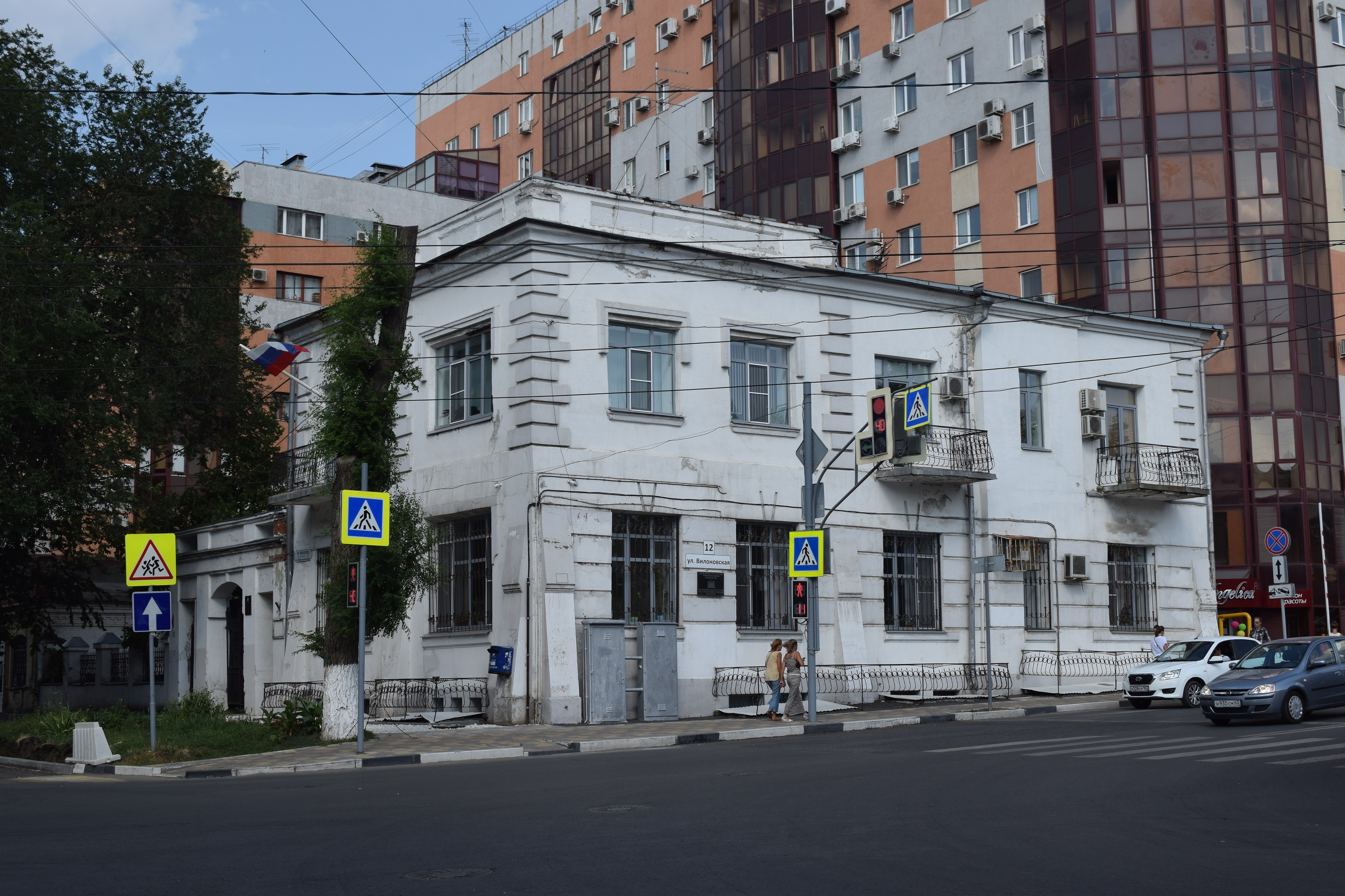 Ул. Чапаевская, д. 181